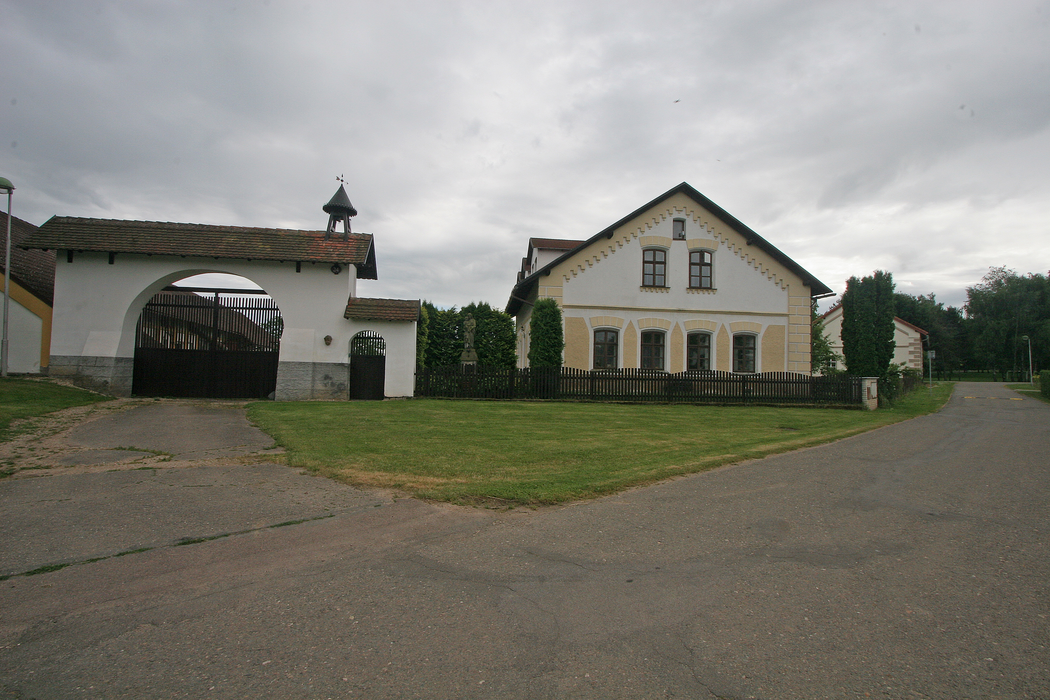 Sovětice čp. 24 brána